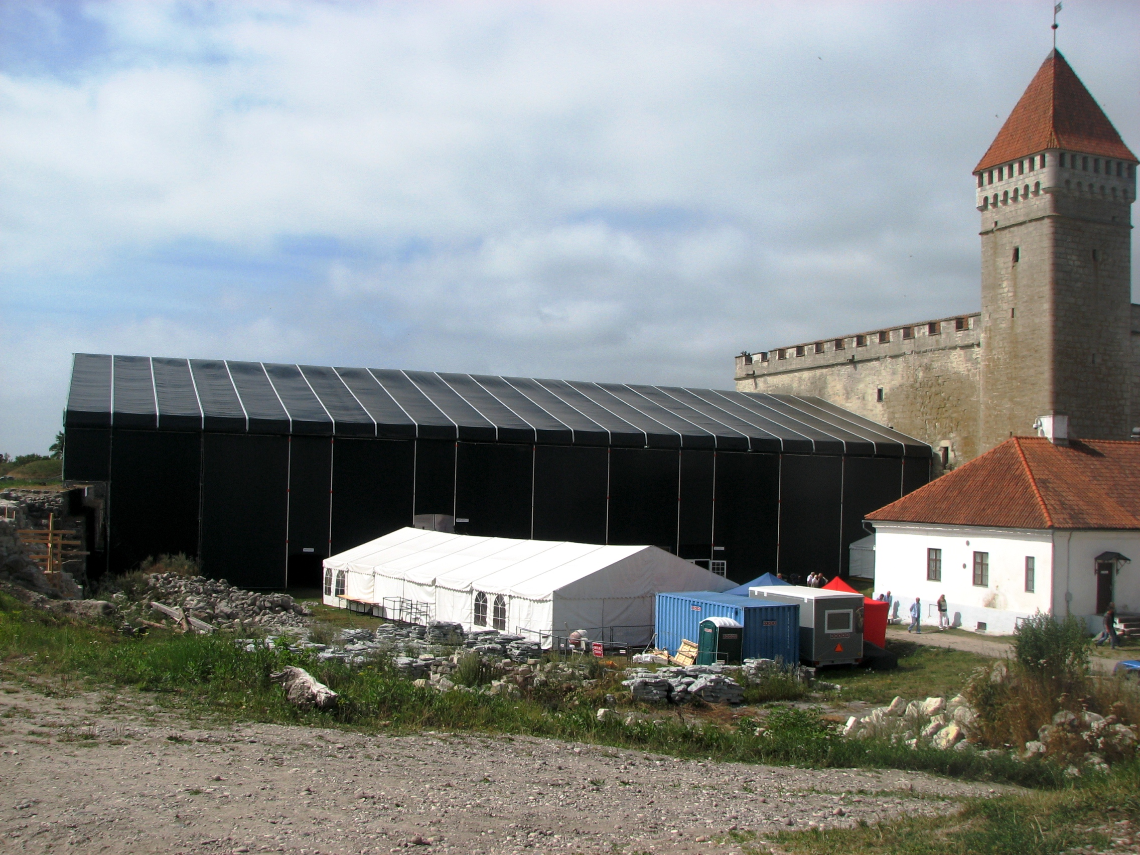 Kuressaare ooperimaja (must) ees paistab valge ooperikohvik, taga on Kuressaare loss